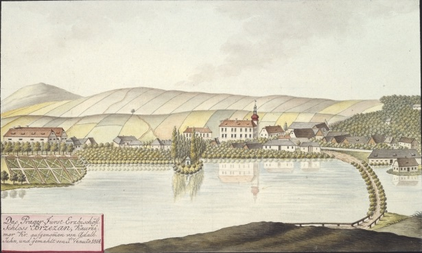 Dolní Břežany. Das Prager Fürst-Erzbischöfl. Schloss Brzezan, Kauřzimer Kr. aufgenommen von Adalb. Juhn, und gemahlt von J. Venuto 1814